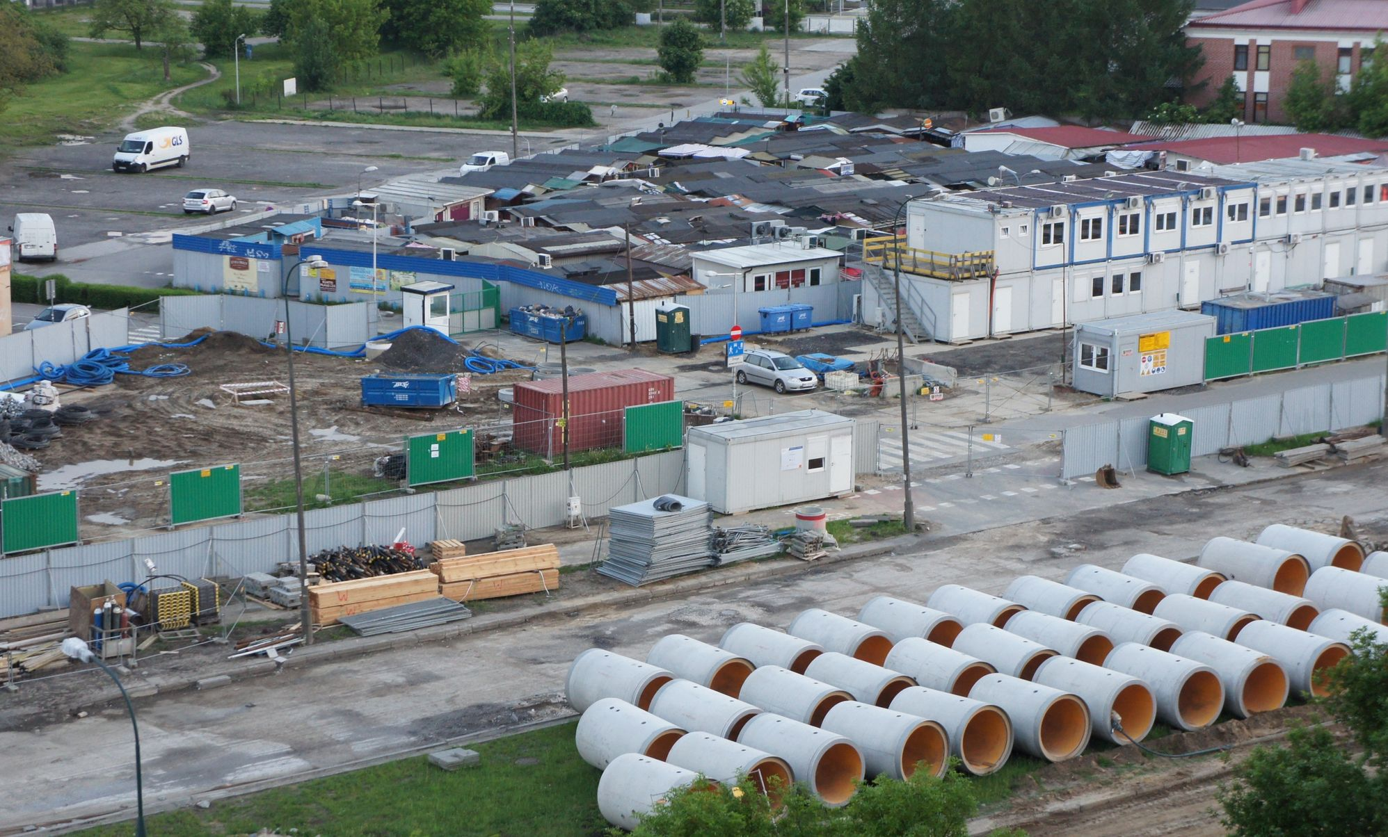 Budowa stacji metra "Bródno" w Warszawie.